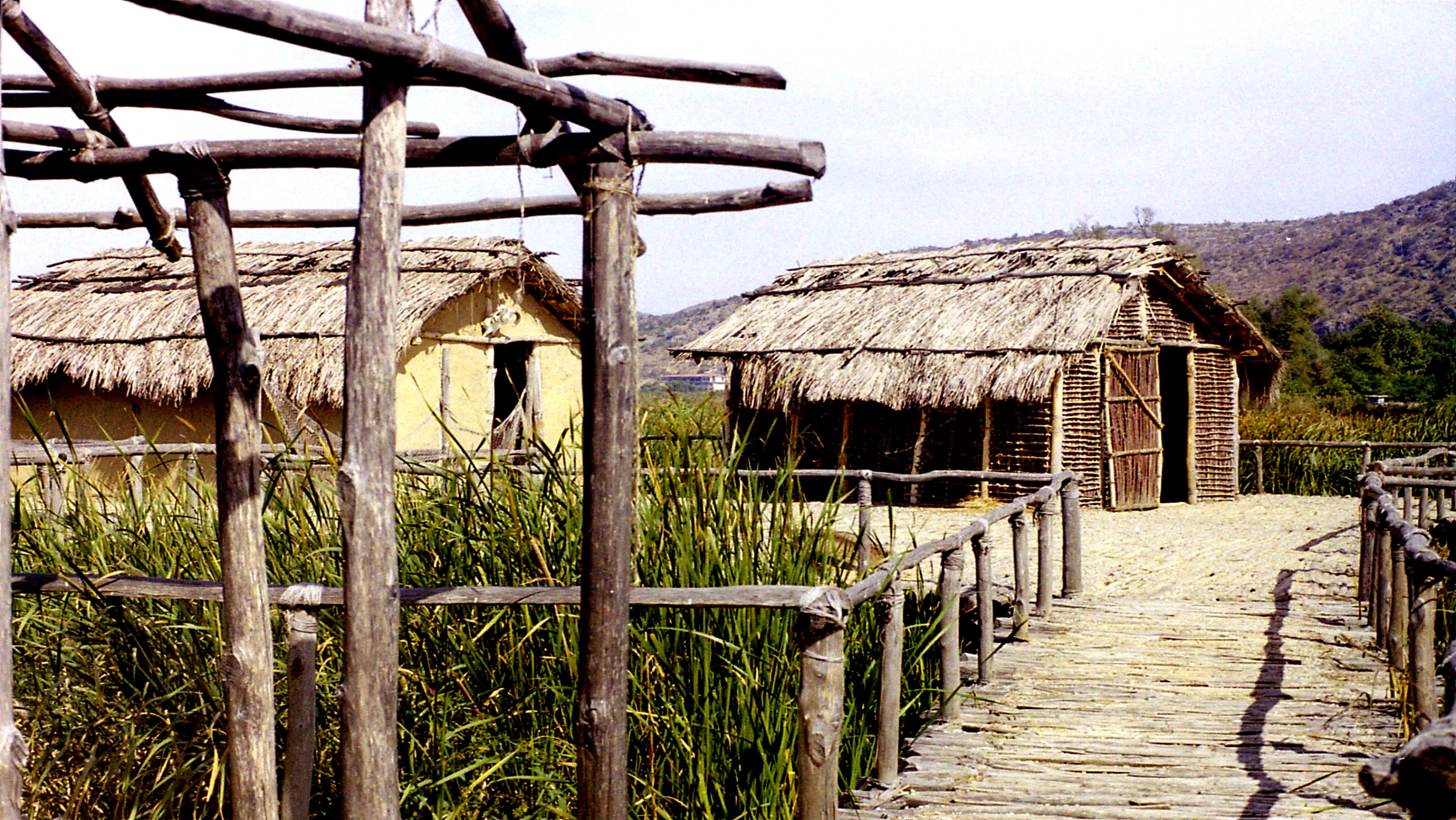 Καστοριά, Δισπιλιό. Ο λιμναίος οικισμός σε αρχαιλογική τοποθεσία 6.500 χρόνων.«Μονή Αγίου Παντελεήμονος»